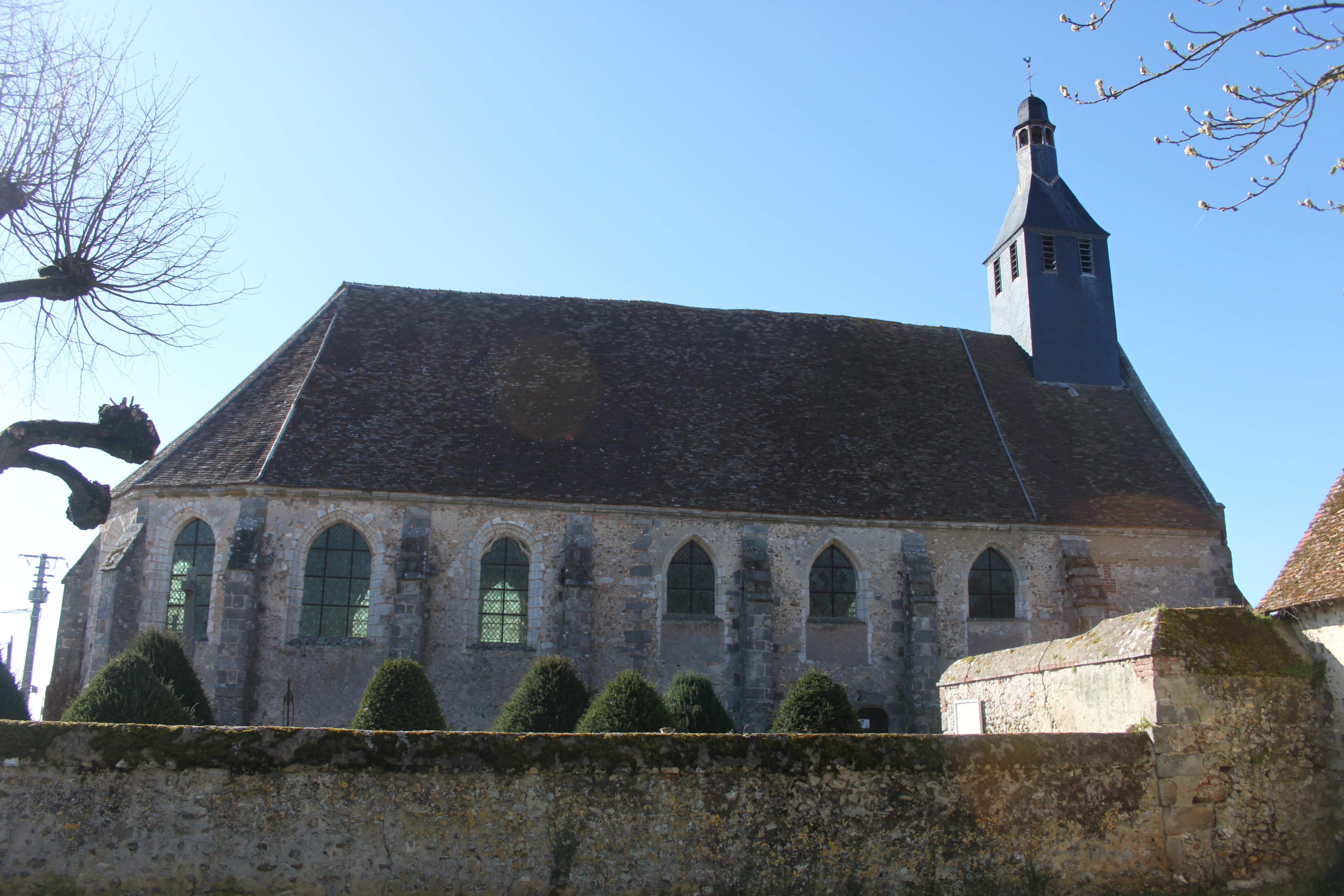 Eglise d'Ormoy en Eure-et-Loir